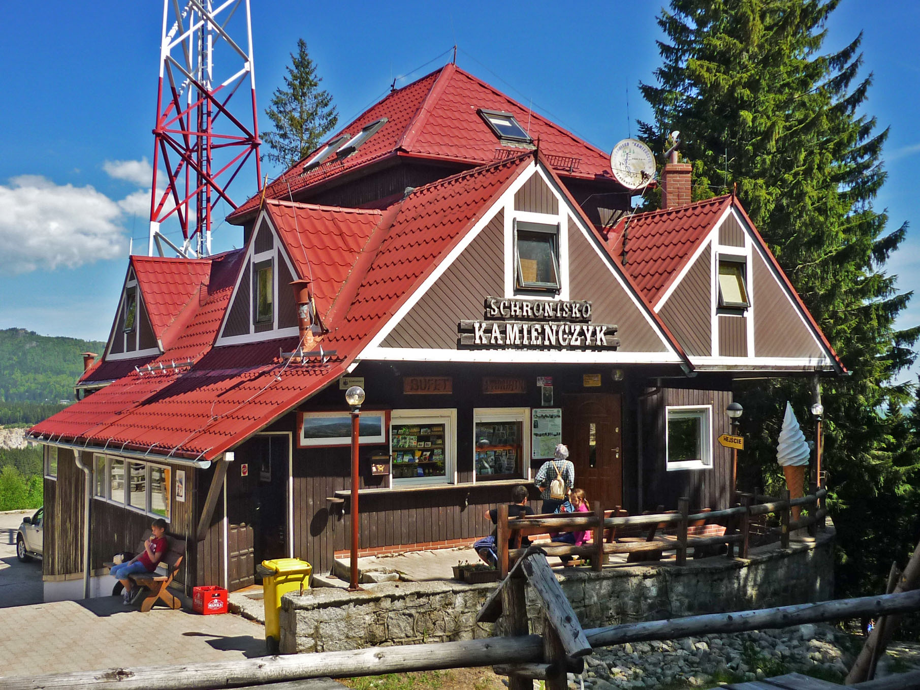 Schronisko Kamieńczyk w Szklarskiej Porębie